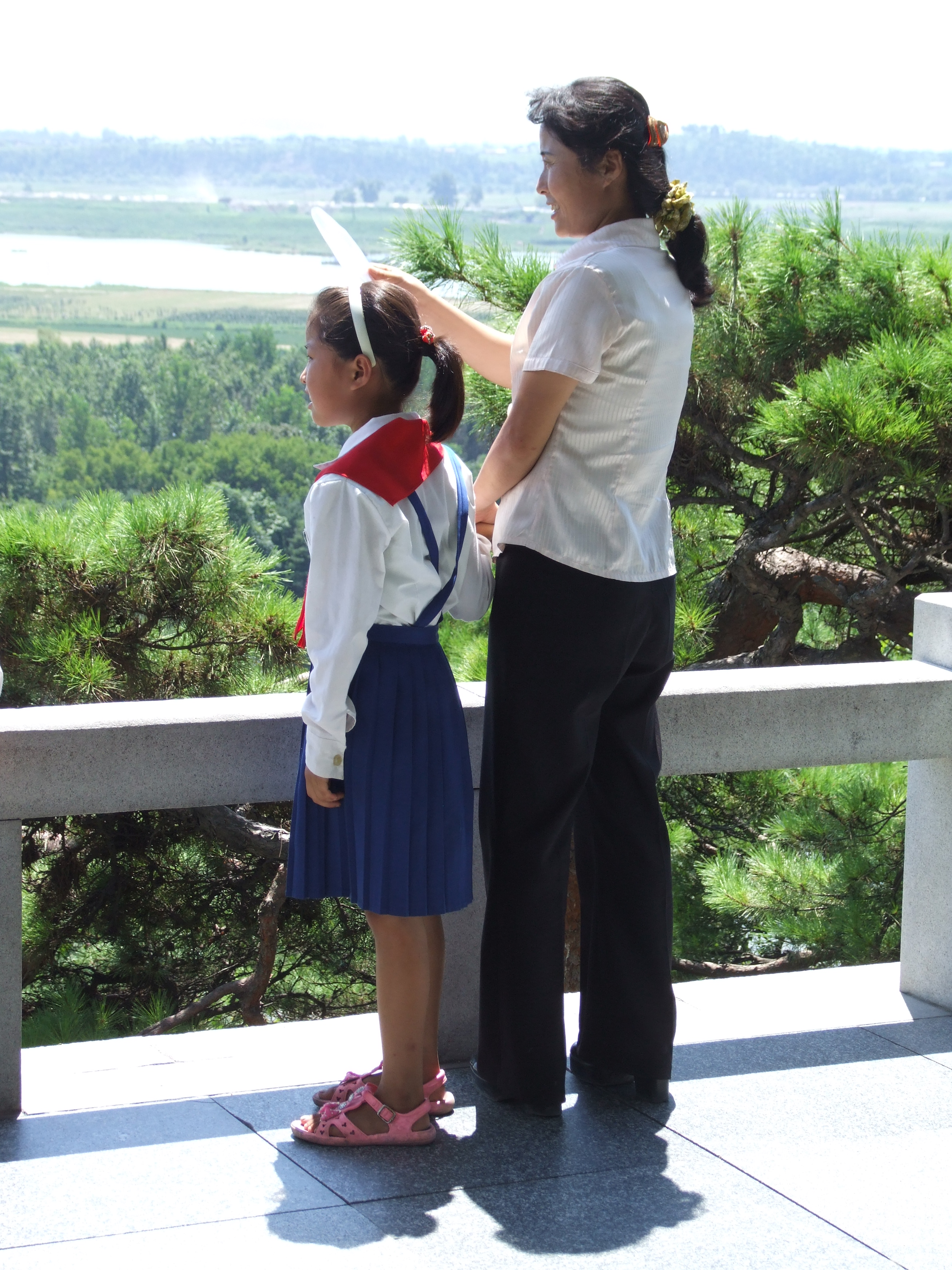 Auf dem Mangyong-Hügel in Mangyŏngdae